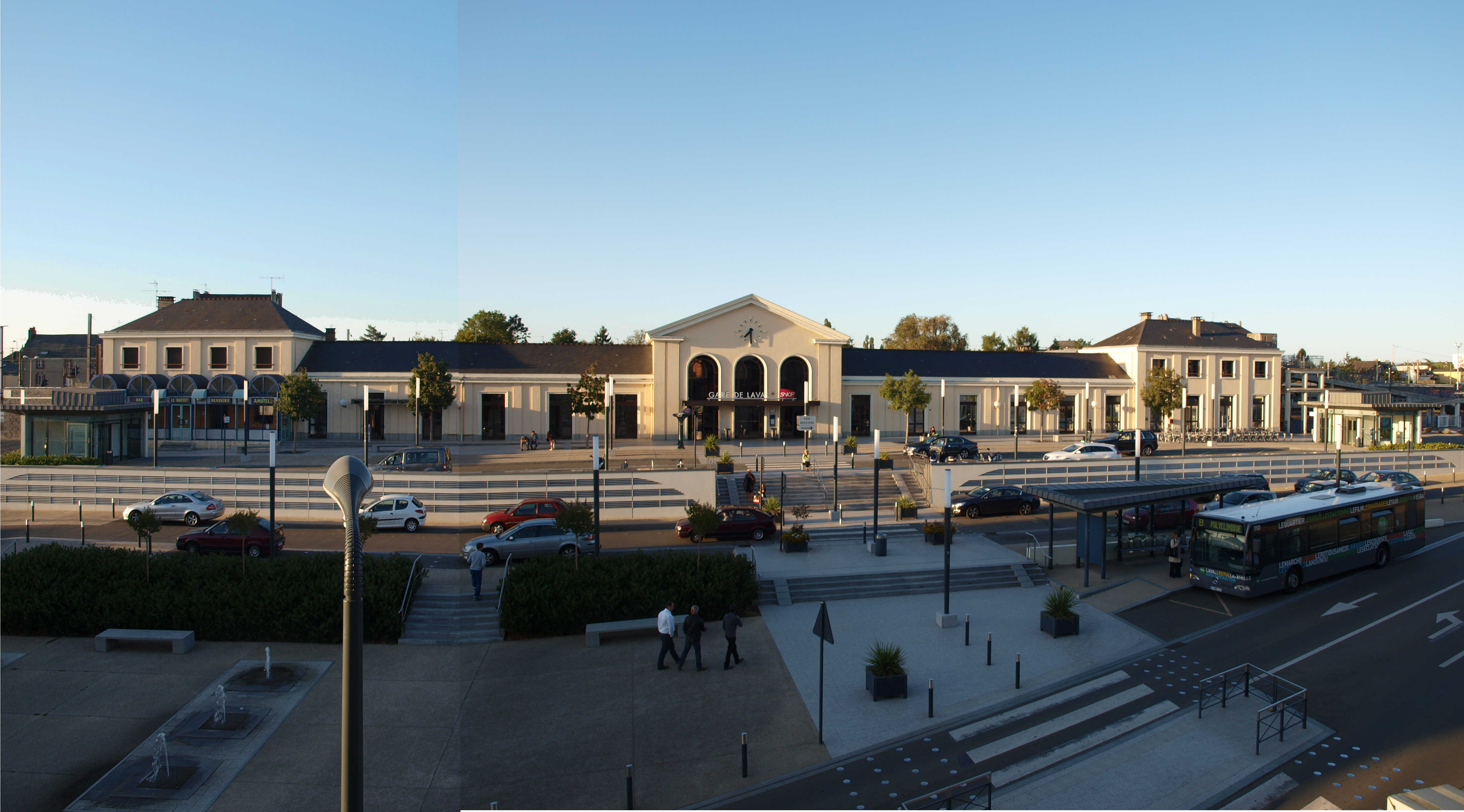 Gare de Laval (Mayenne, France); photo panoramique (2 photos), vue depuis le Marin'Hotel